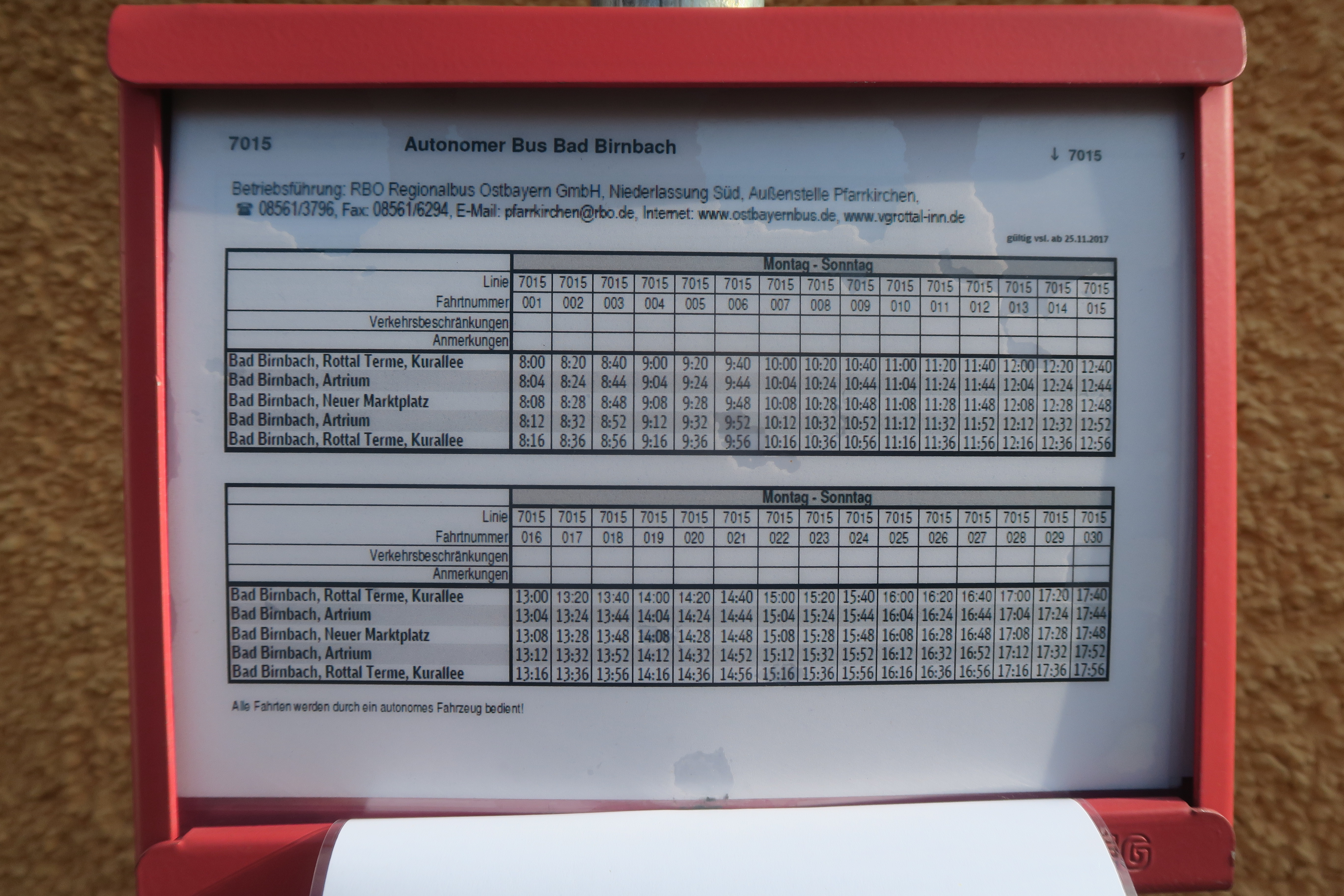 Autonomes Fahrzeug Bad Birnbach - Fahrplan